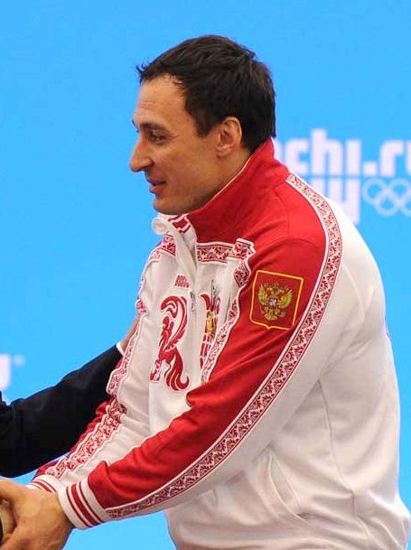 Орденом «За заслуги перед Отечеством» четвёртой степени награждён двукратный олимпийский чемпион в бобслее Алексей Воевода.